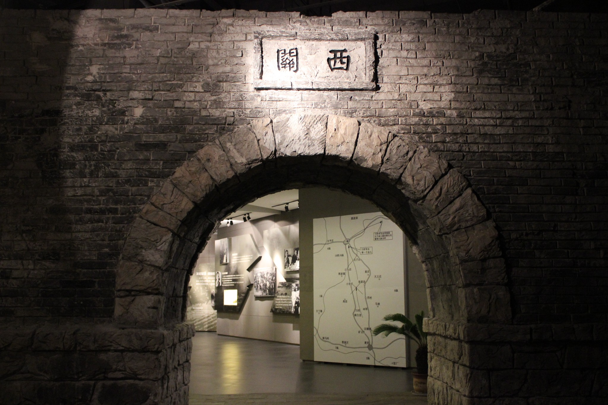 莱芜西关门仿品，在莱芜战役纪念馆